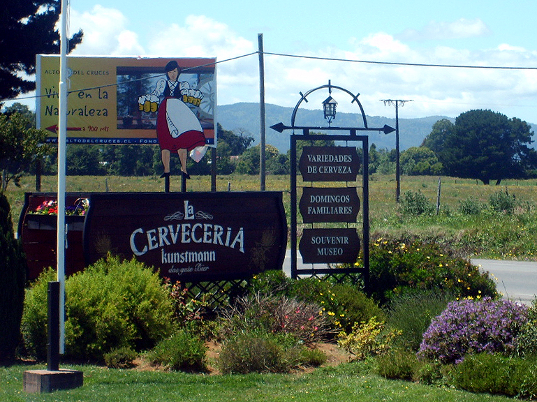 Entrada a la cervecería Kunstmann, Valdivia, Chile.